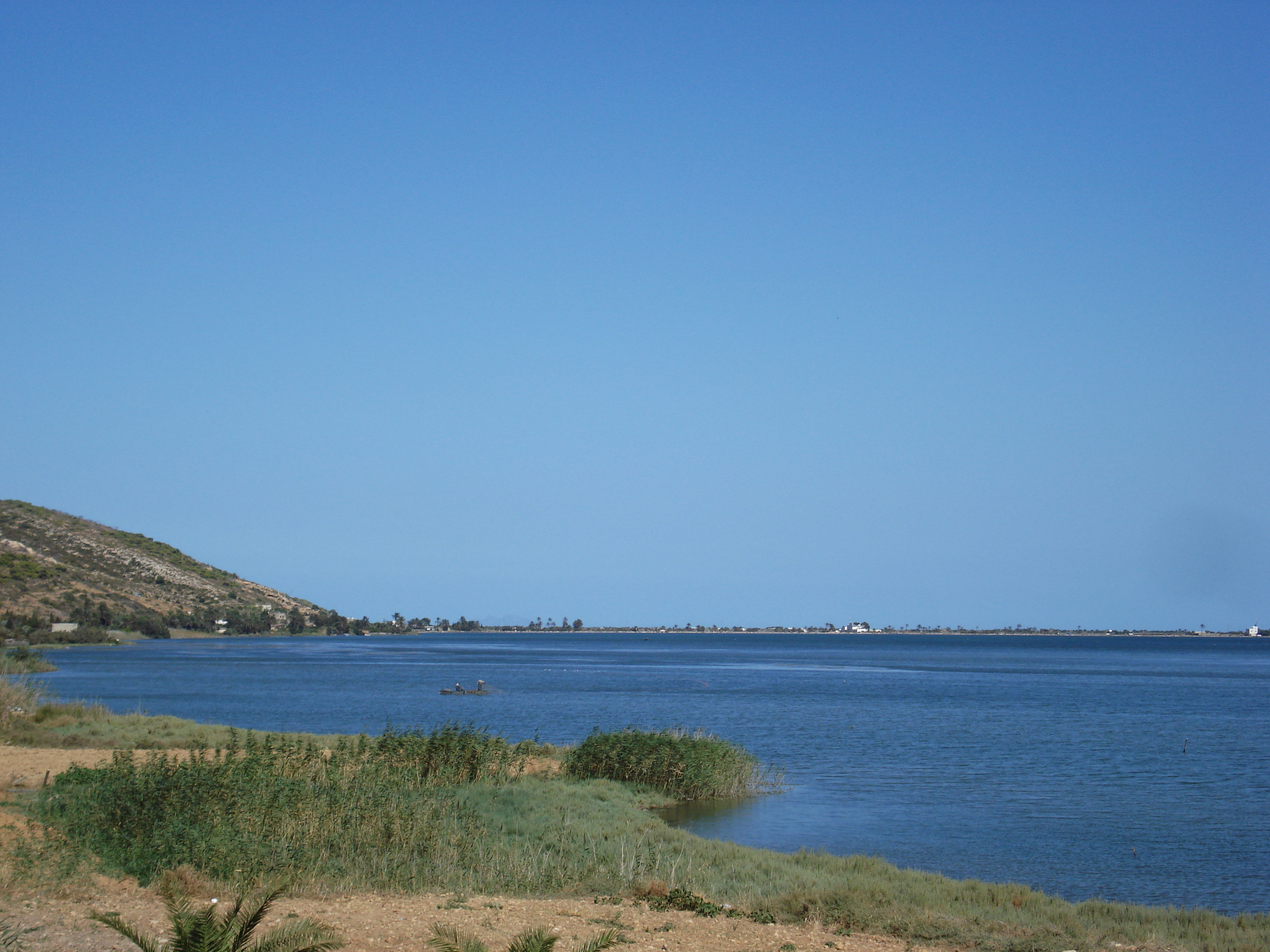 Lac de Ghar El Melh, Tunisie.